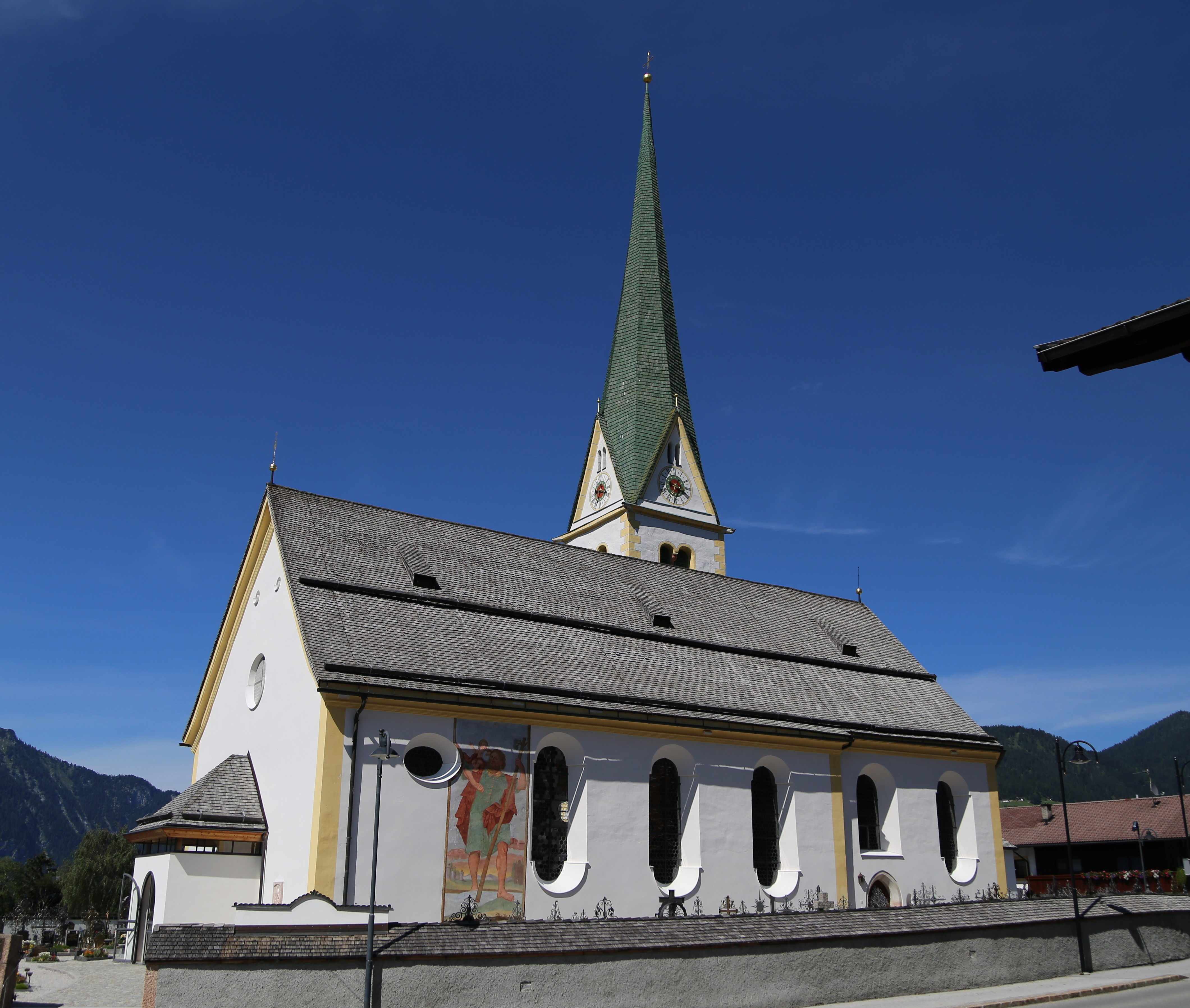 Sankt Georg, Brandenberg (Tirol)